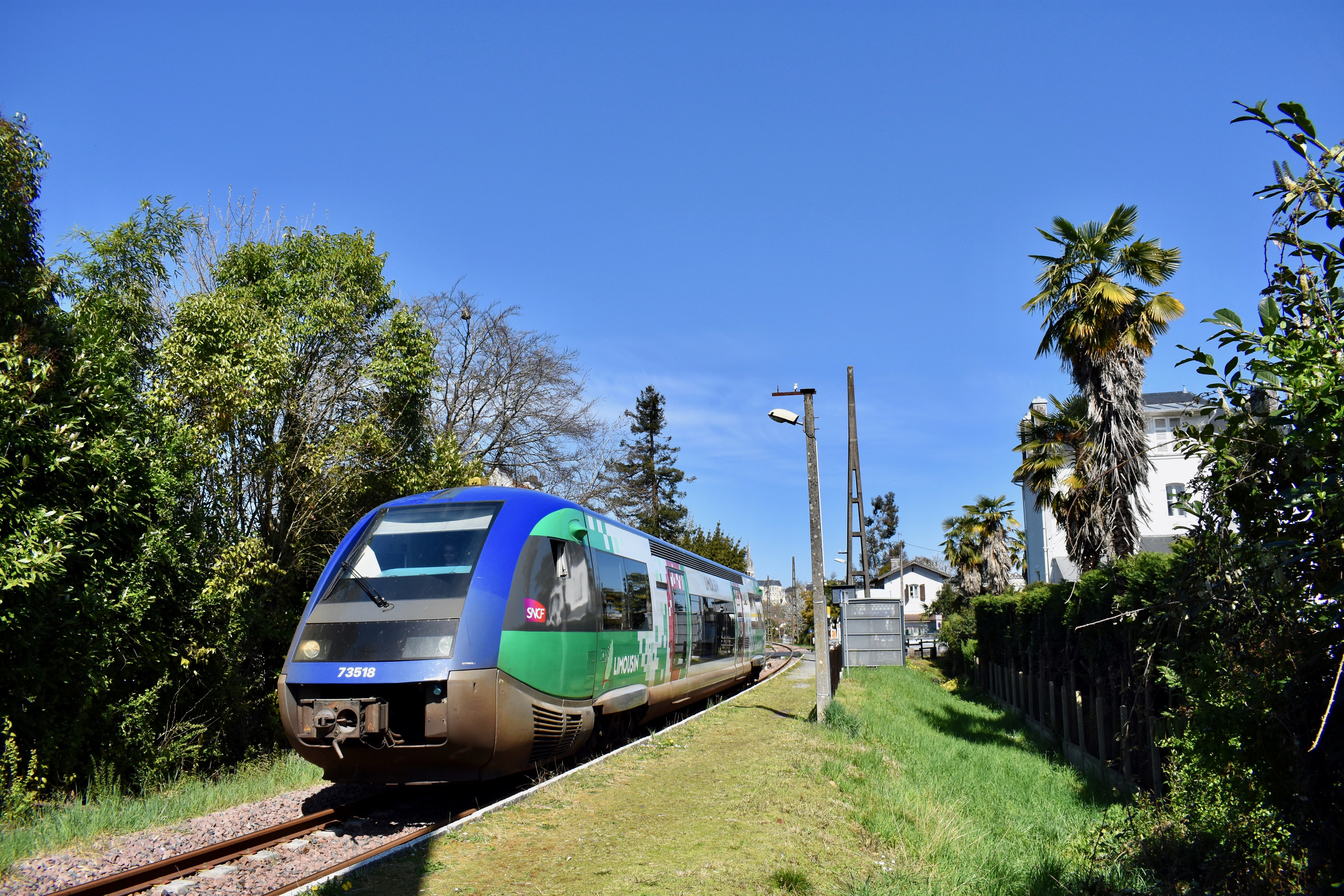 X73500 du réseau TER Nouvelle-Aquitaine en gare de La Croix-du-Prince à Pau.